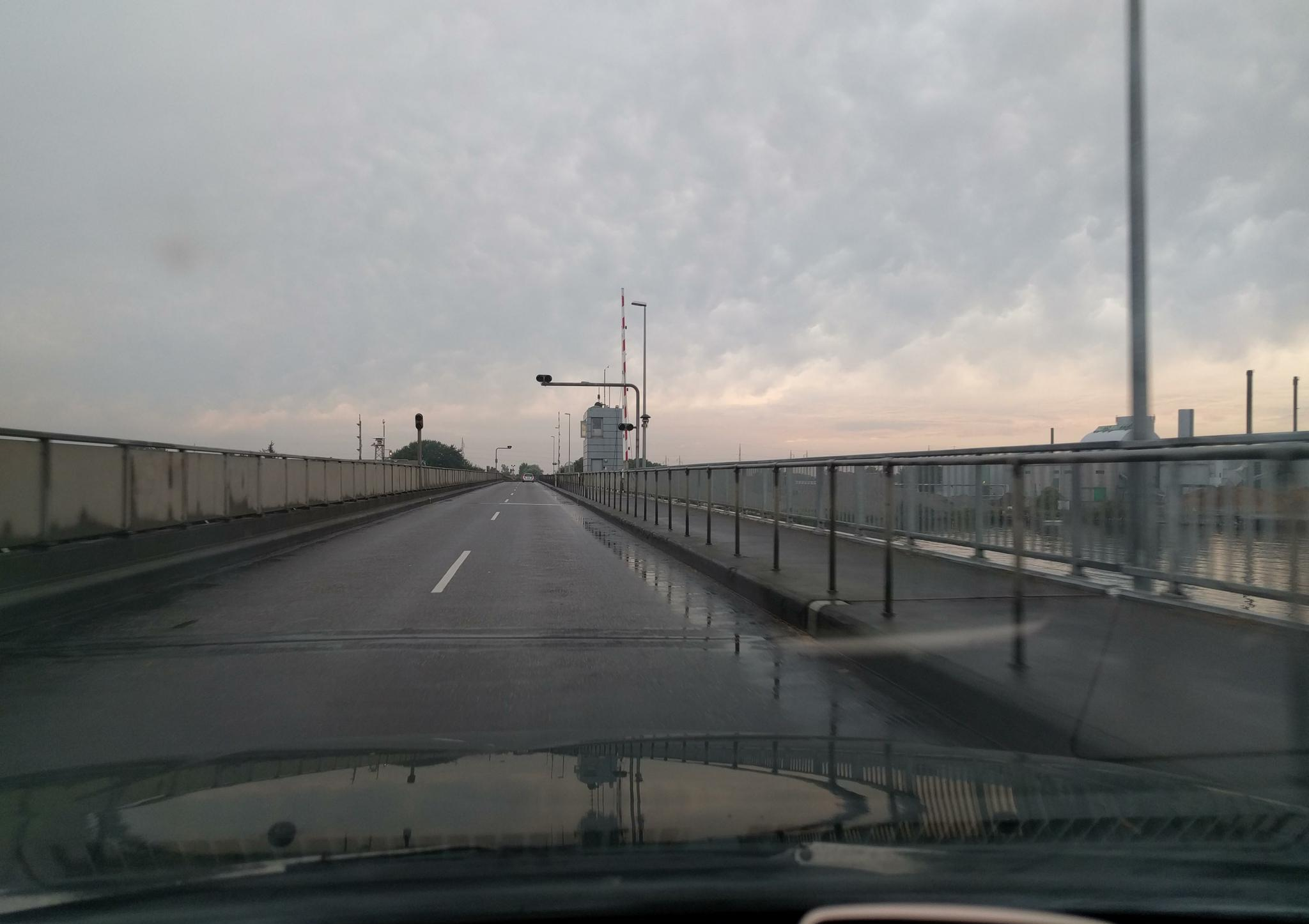 Masnedsundbroen